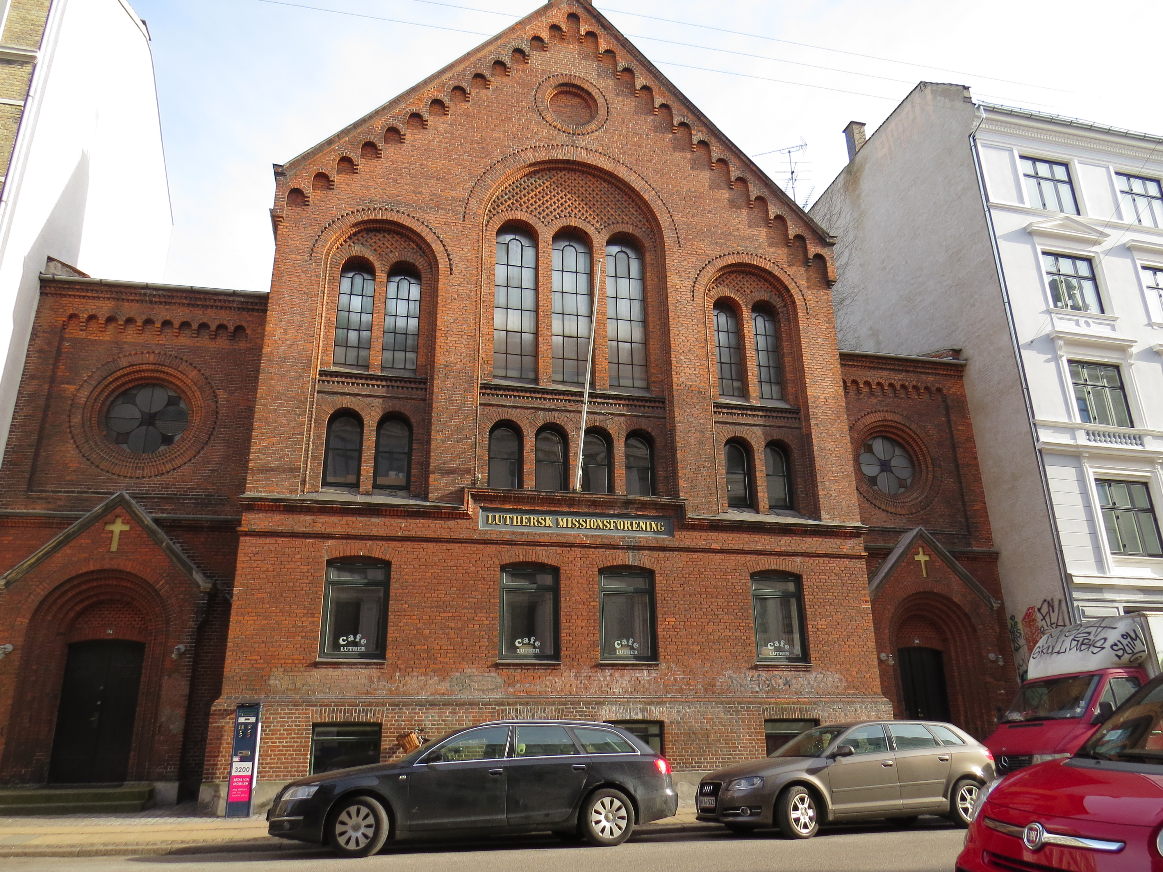 Luthersk Missionsforening, Nansensgade, København